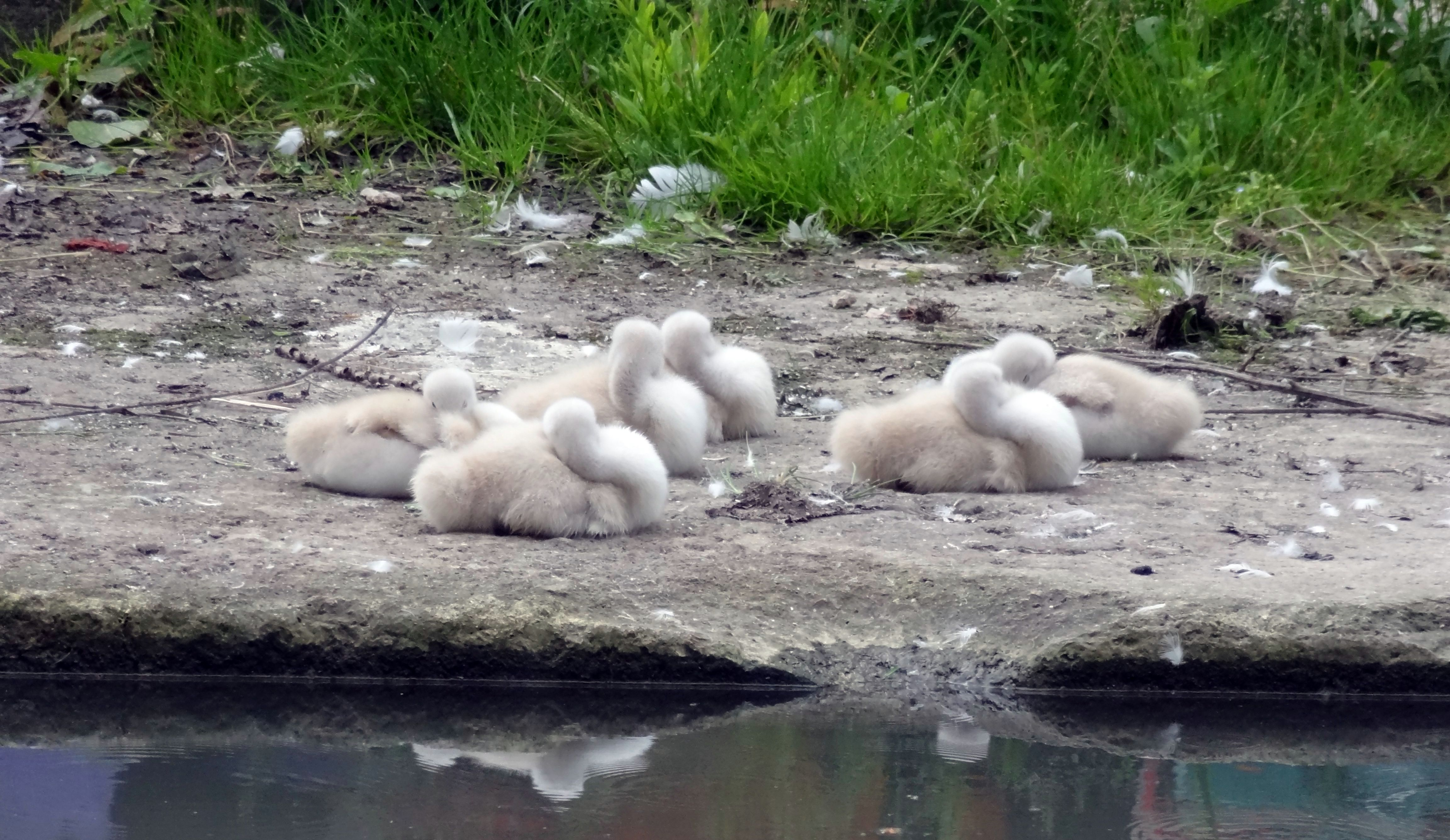 Le long du canal de l'Ourcq, à Sevran.